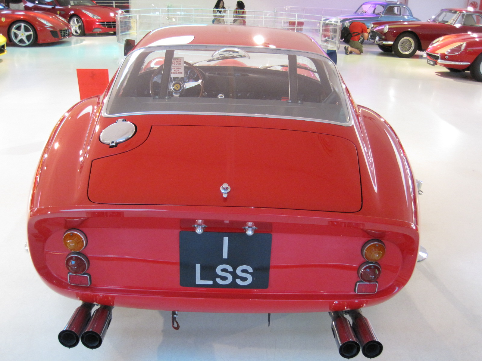 Automobiles in the Galleria Ferrari - Ferrari 250 GTO - V12 - 1962